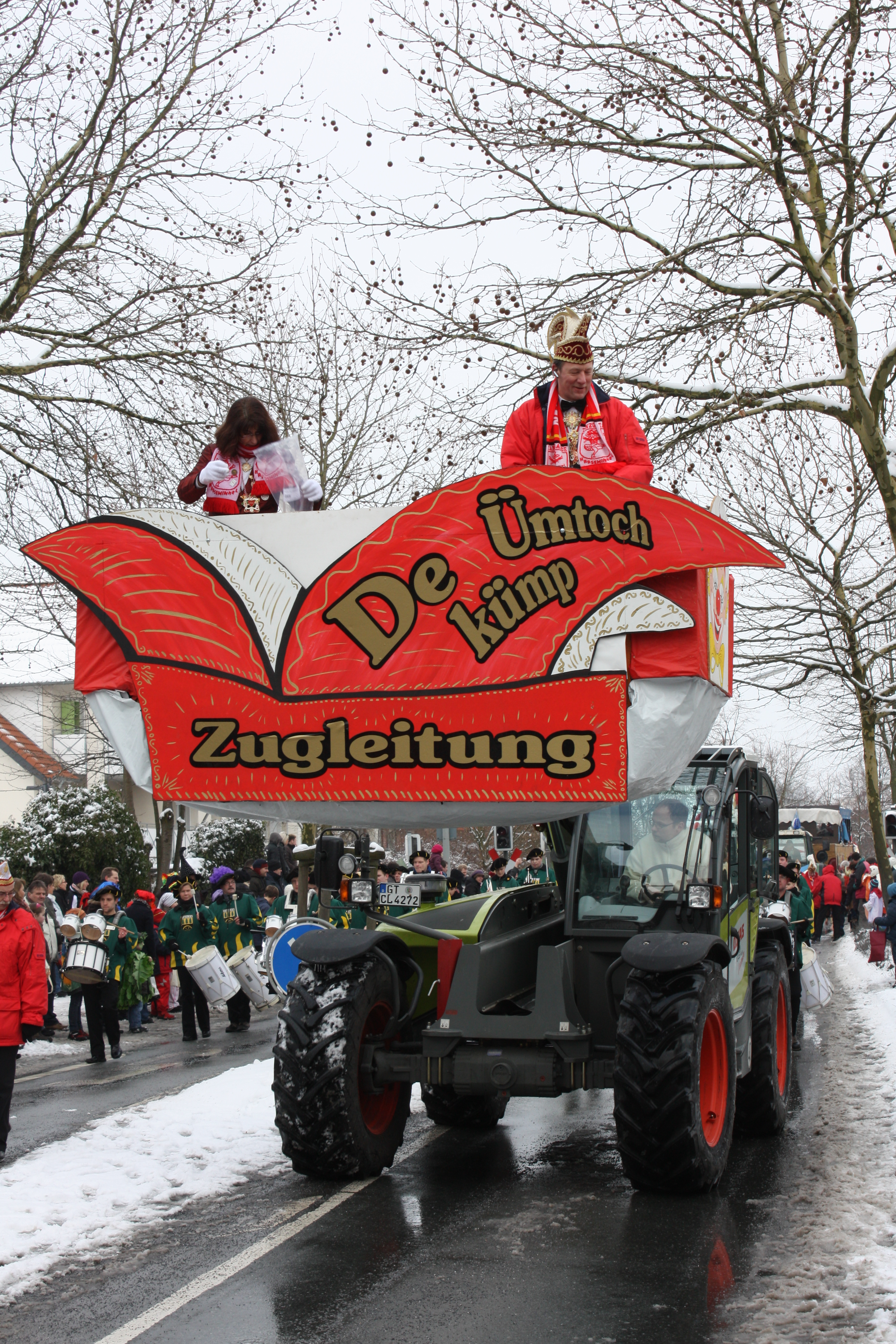 Karenvalsumzug 2010 in Harsewinkel, Zugleitung auf einem Claas-Teleskoplader Scorpion